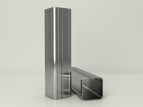 Профильная труба с фальцевым швом